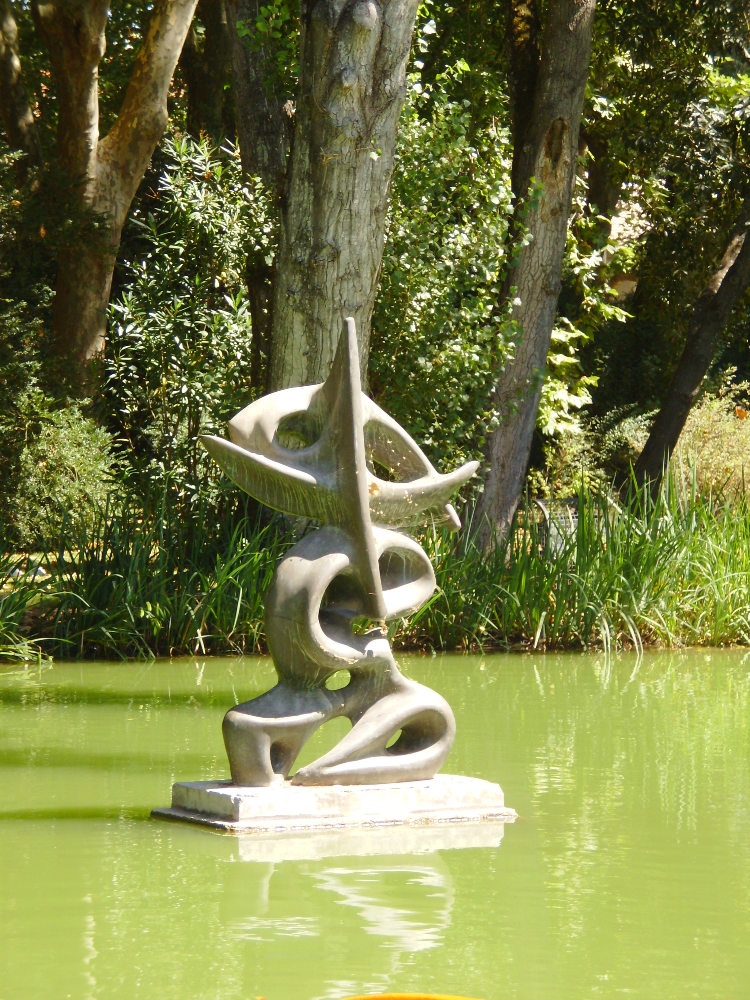 Parque D. Carlos I, Caldas da Rainha, Distrito de Leiria, Portugal: escultura no lago.